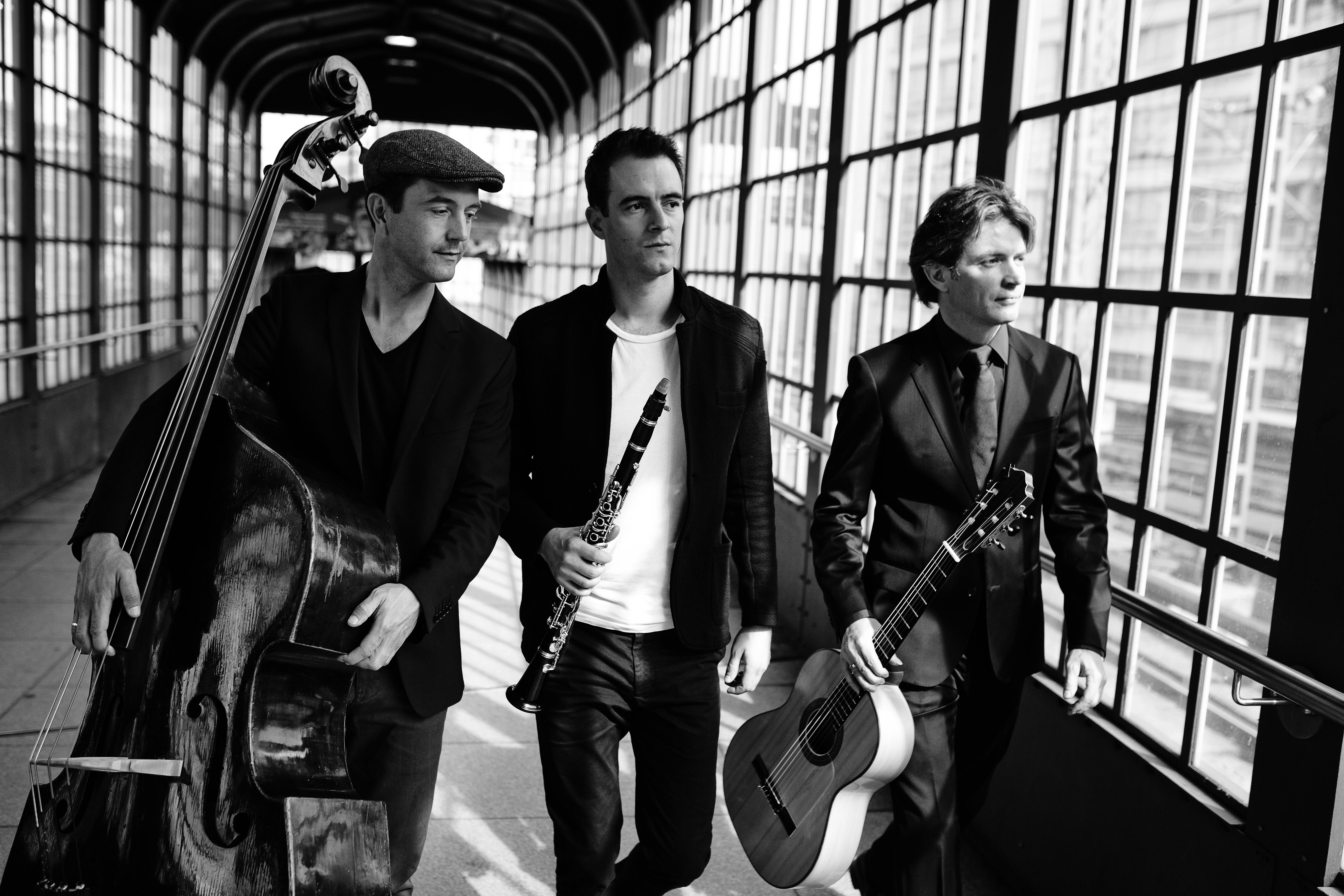 Pressefoto David Orlowsky Trio